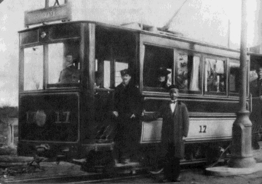 Двуосна трамвайна мотриса на Societé Anonyme des Tramways electriques de Sofia, 1901